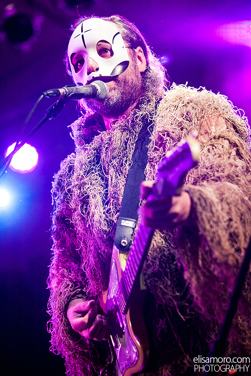 La Tempesta Gemella, evento dell'etichetta indipendente musicale italiana La Tempesta Dischi, Piazzale del Verano, Roma, 23-24 giugno 2014. This image contains digital watermarking or credits in the image itself. The usage of visible watermarks is discouraged. If a non-watermarked version of the image is available, please upload it under the same file name and then remove this template. Ensure that removed information is present in the image description page and replace this template with metadata from image or attribution metadata from licensed image . Caution: Before removing a watermark from a copyrighted image, please read the WMF's analysis of the legal ramifications of doing so, as well as Commons' proposed policy regarding watermarks. If the old version is still useful, for example if removing the watermark damages the image significantly, upload the new version under a different title so that both can be used. After uploading the non-watermarked version, replace this template with superseded|new filename|version without watermarks .